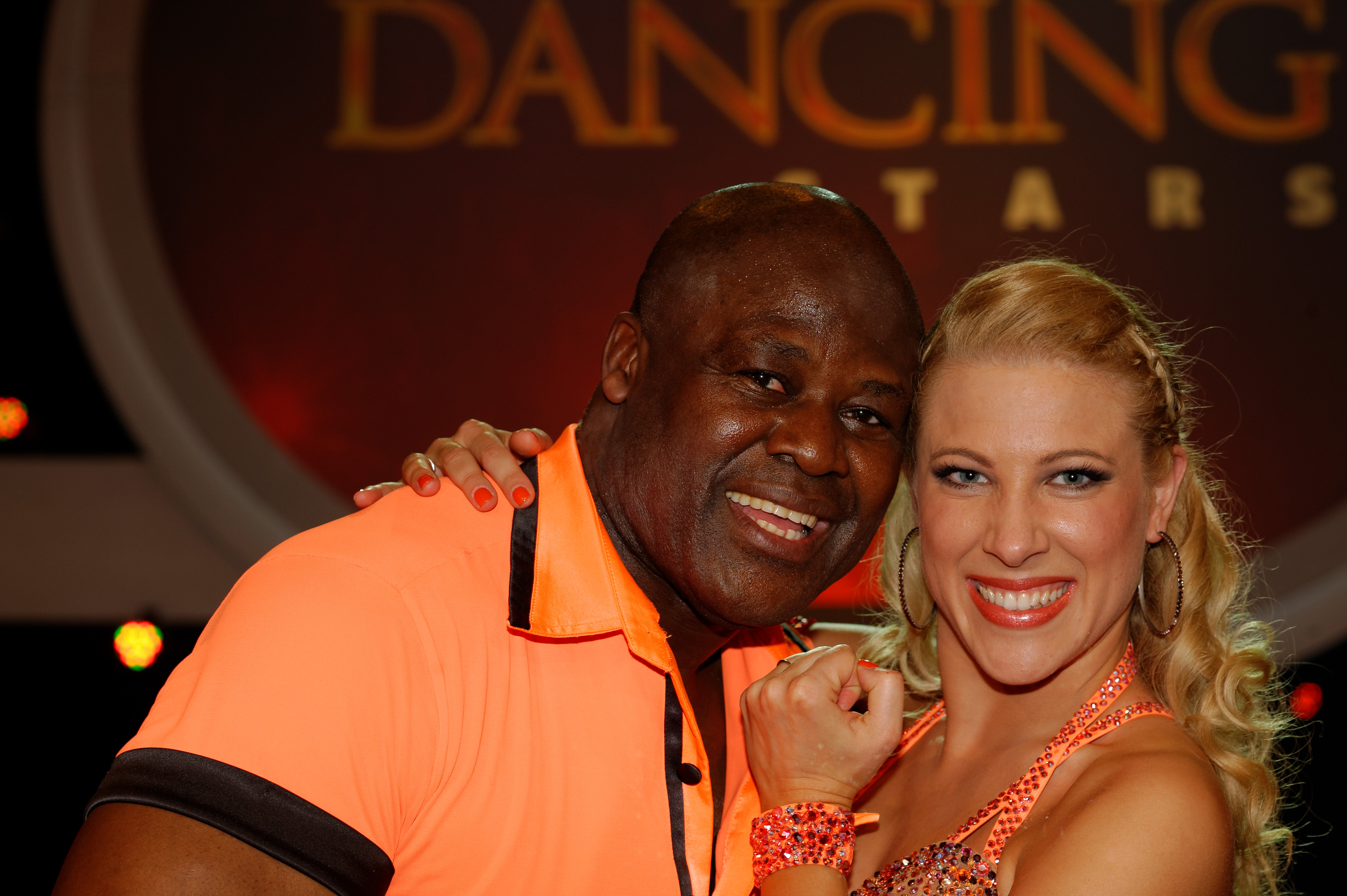 "Dancing Stars" am 5. April 2013 Biko Botowamungu und Maria Jahn